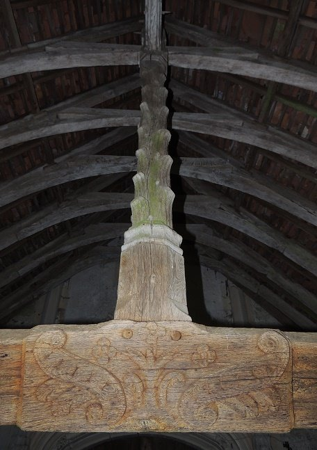 Église Saint-Éman; sous le porche de la façade occidentale, les motifs de fleurs de la poutre horizontale et le tronc aux branches coupées à la verticale sur fond de poutrelles de support du toit de petites tuiles